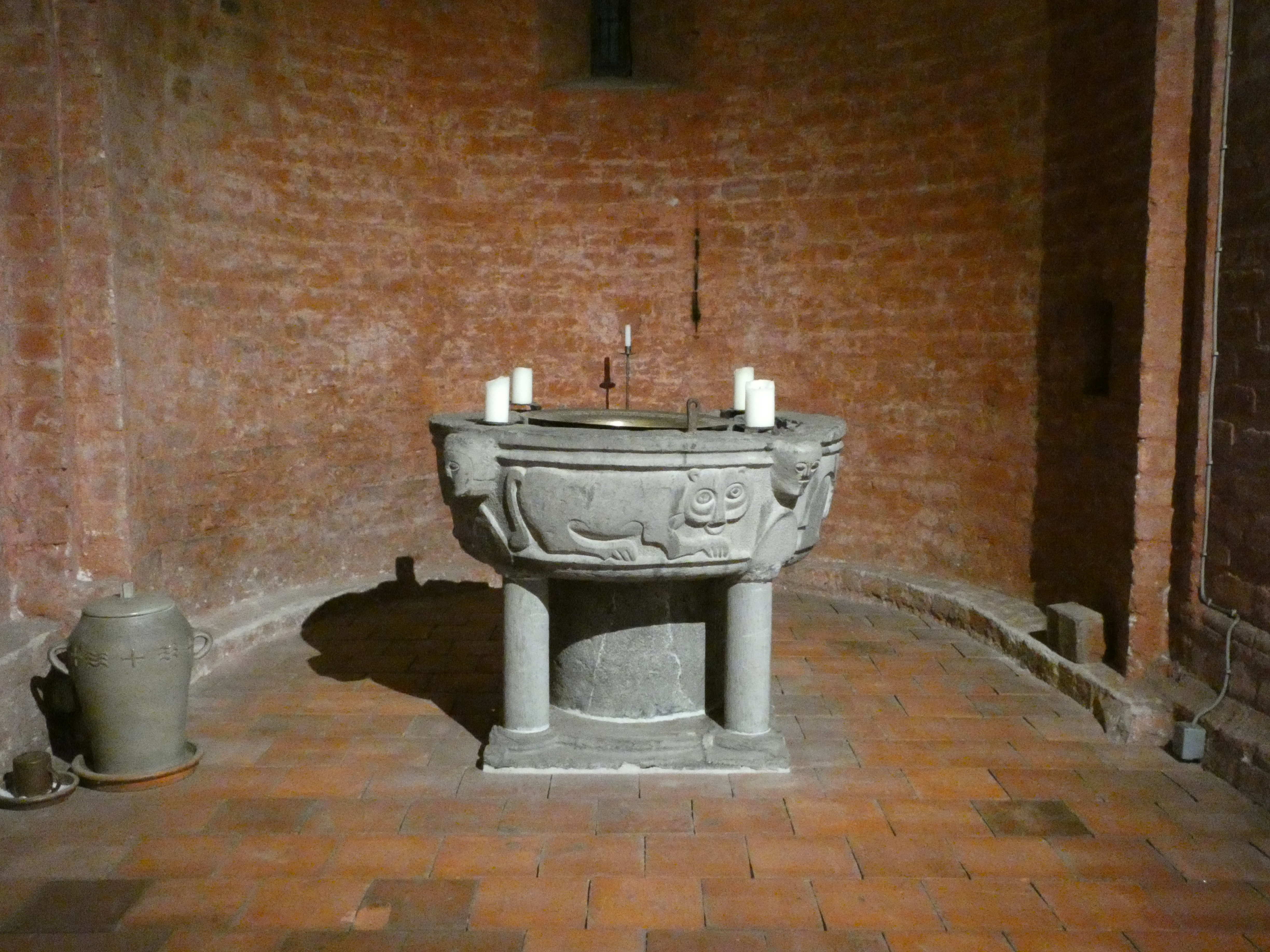 Taufstein St. Nikolai, Brandenburg; vormals Maternuskapelle in Haus Bürgel; vom Eigentümer Adolf Graf von Nesselrode als Dauerleihgabe nach St. Nikolai gegeben